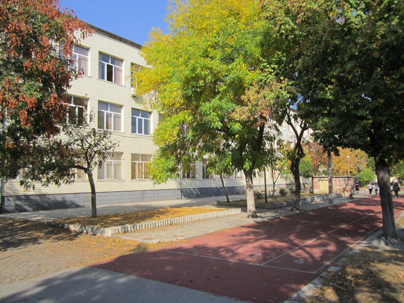 Лекоатлетическа писта в двора на СОУ "Георги Брегов". Снимка: училищен архив